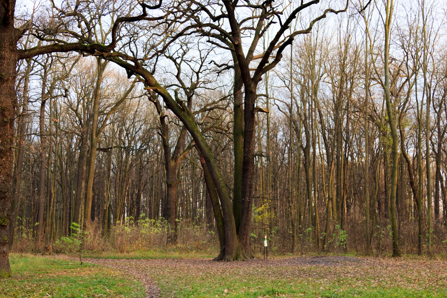 Památný čtyřkmen v PP Bažantnice v Satalicích. Dub letní.